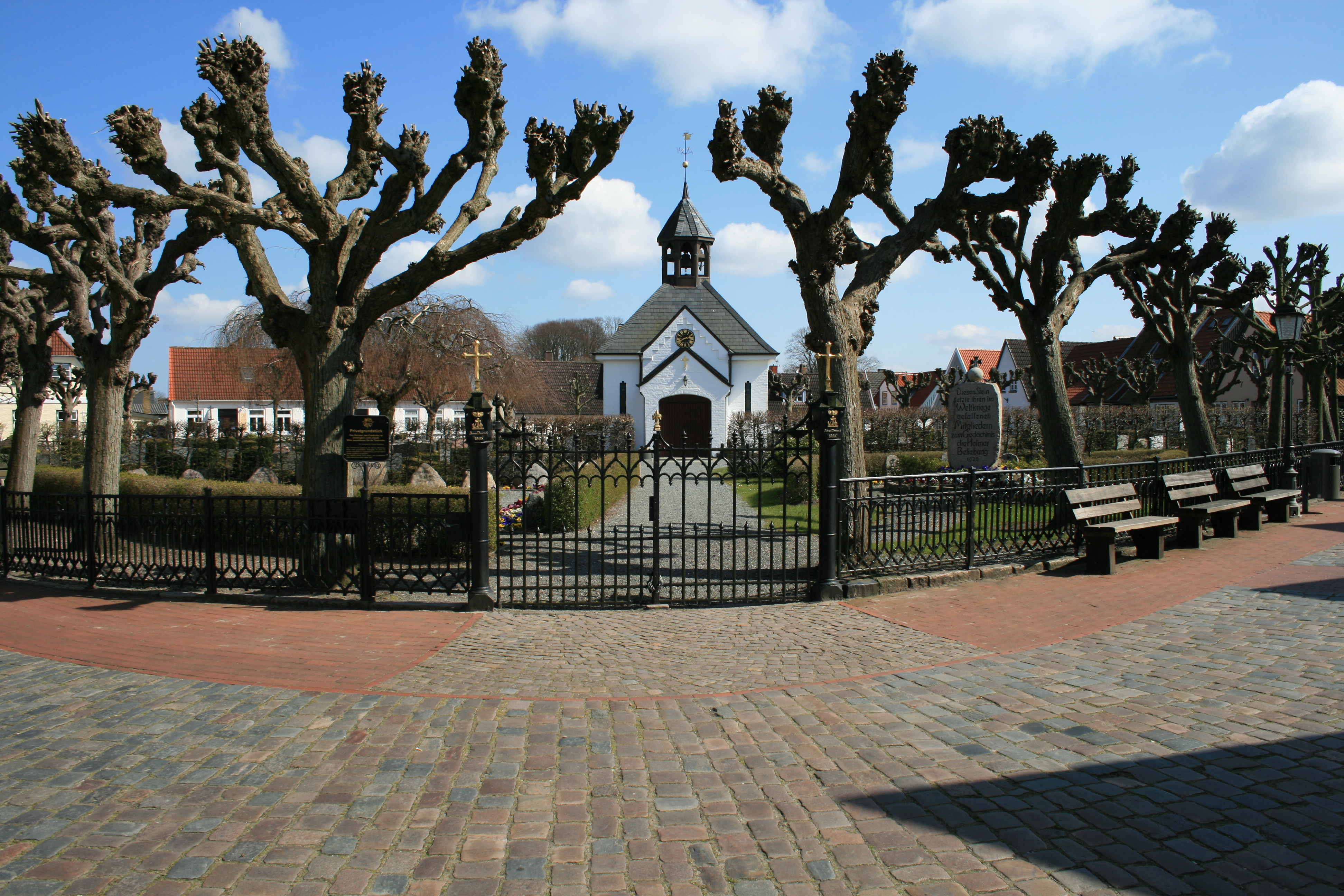 Schleswig Holmer Kapelle